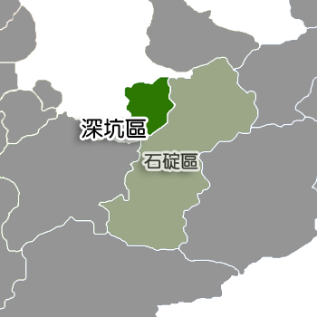 深坑區相對位置。